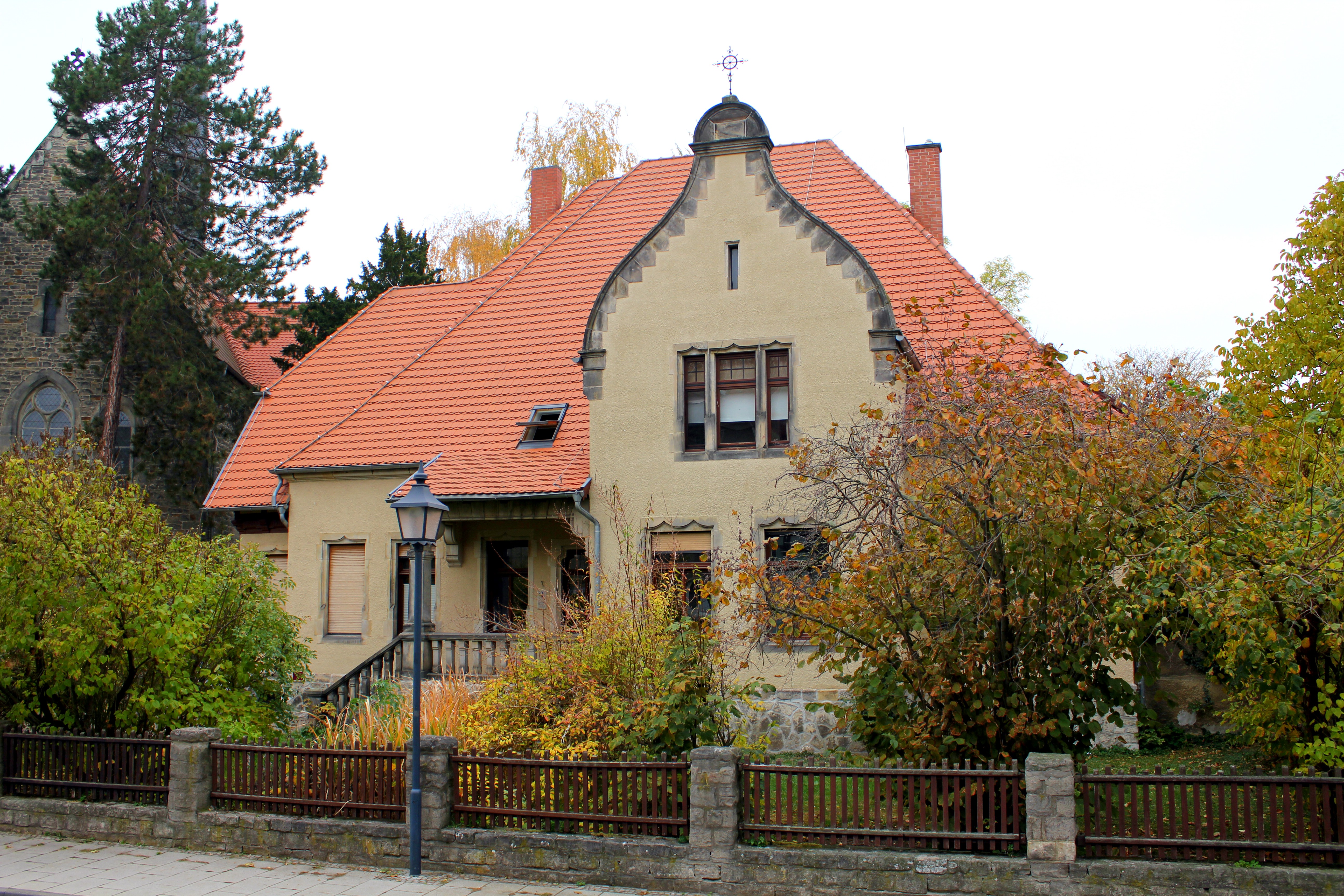 Pfarrhaus Schloßstraße 26 Barby